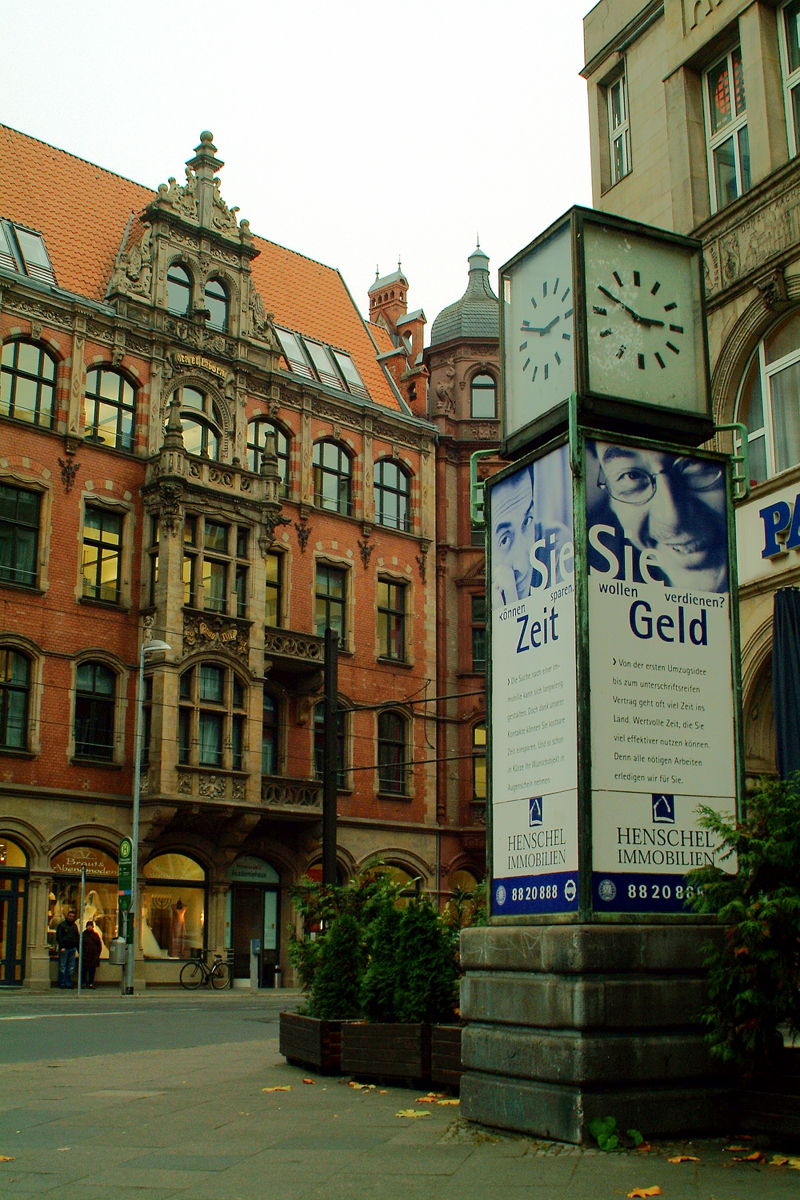 Eine der zehn erhaltenen futuristischen Falke-Uhren in Hannover, hier am Thielenplatz vor dem Kaiserhaus; im Hintergrund das Akademiehaus der Dr. Buhmann Schule in der Prinzenstraße. Am Fuß der Standuhr findet sich über dem Steinsockel die Inschrift mit den Herstellerangaben: "Metallkunst Herrenhausen.